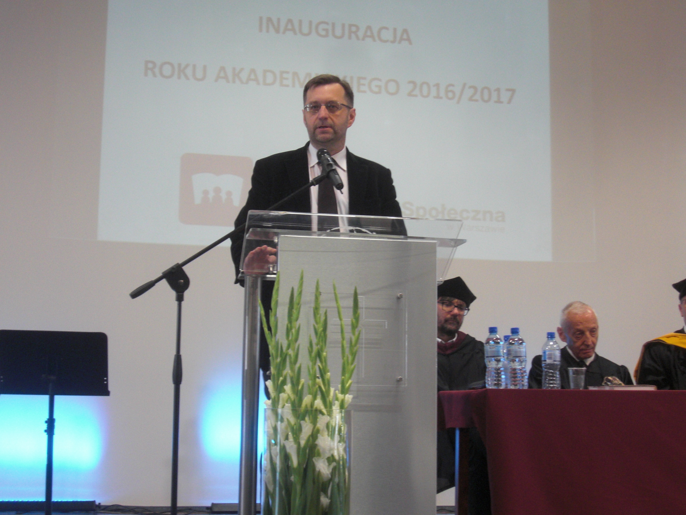 T.J. Zieliński, Inauguracja roku akademickiego, WSTS, 2016-10-01